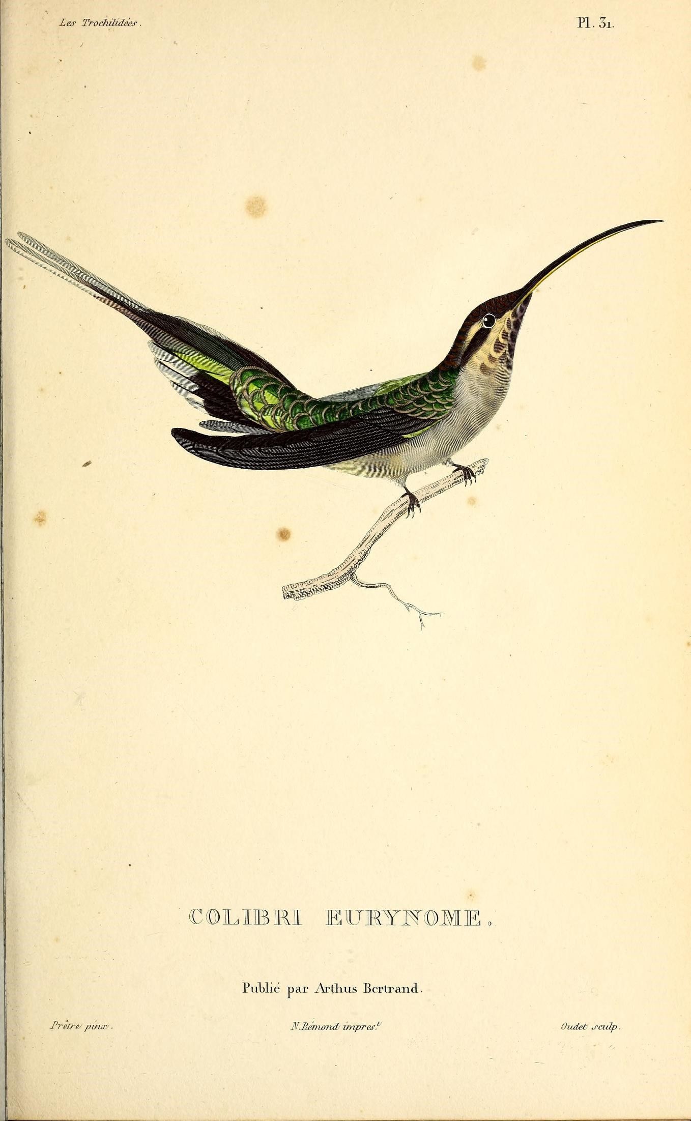 Les trochilidées :. Paris :A. Bertrand,[1832?].